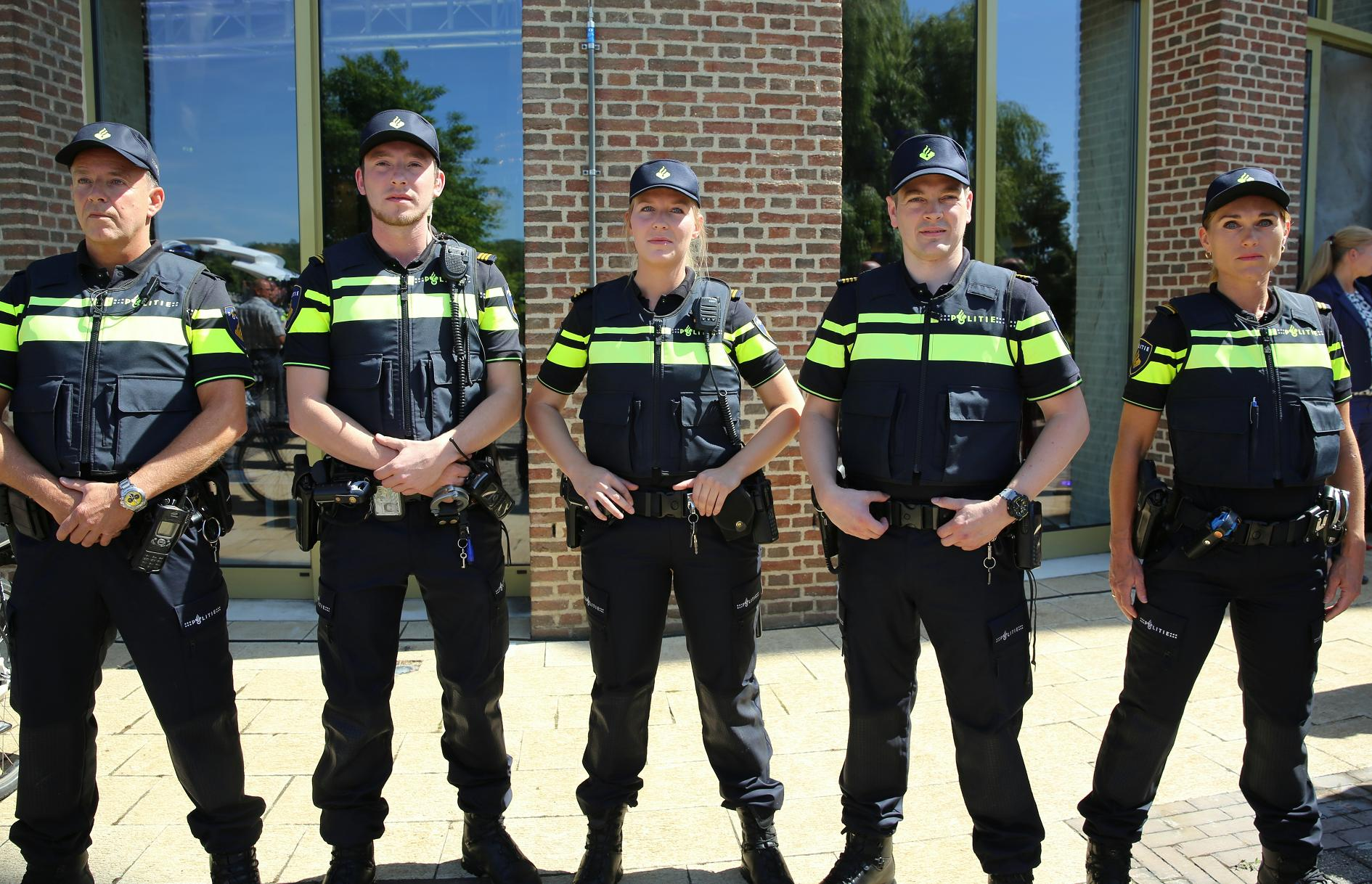 Politie Nederland nieuwe uniform